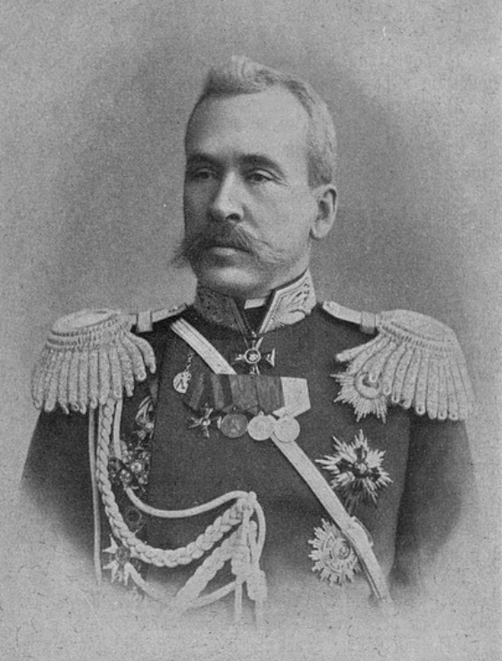 Яков Григорьевич Жилинский, Варшавский генерал-губернатор.